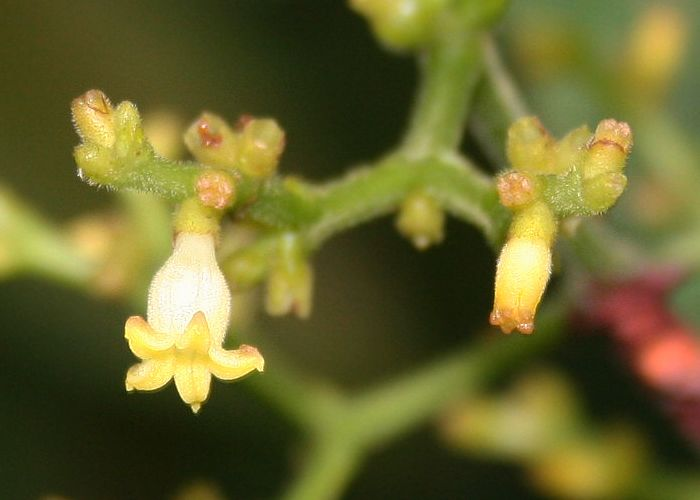 Psychotria solitudinum, Kaffeegewächse (Rubiaceae) - Costa Rica: Prov. Puntarenas, La Gamba NW Golfito, "Riverbed Trail" zwischen "Tropenstation La Gamba"/"Estación Biológica La Gamba" und "Esquinas Rainforest Lodge"